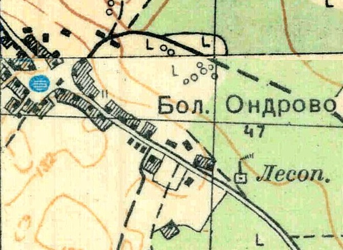 Топографическая карта Ленинградской области, квадрат О-35-24-Б-в (Вохоново), деревня Большое Ондрово